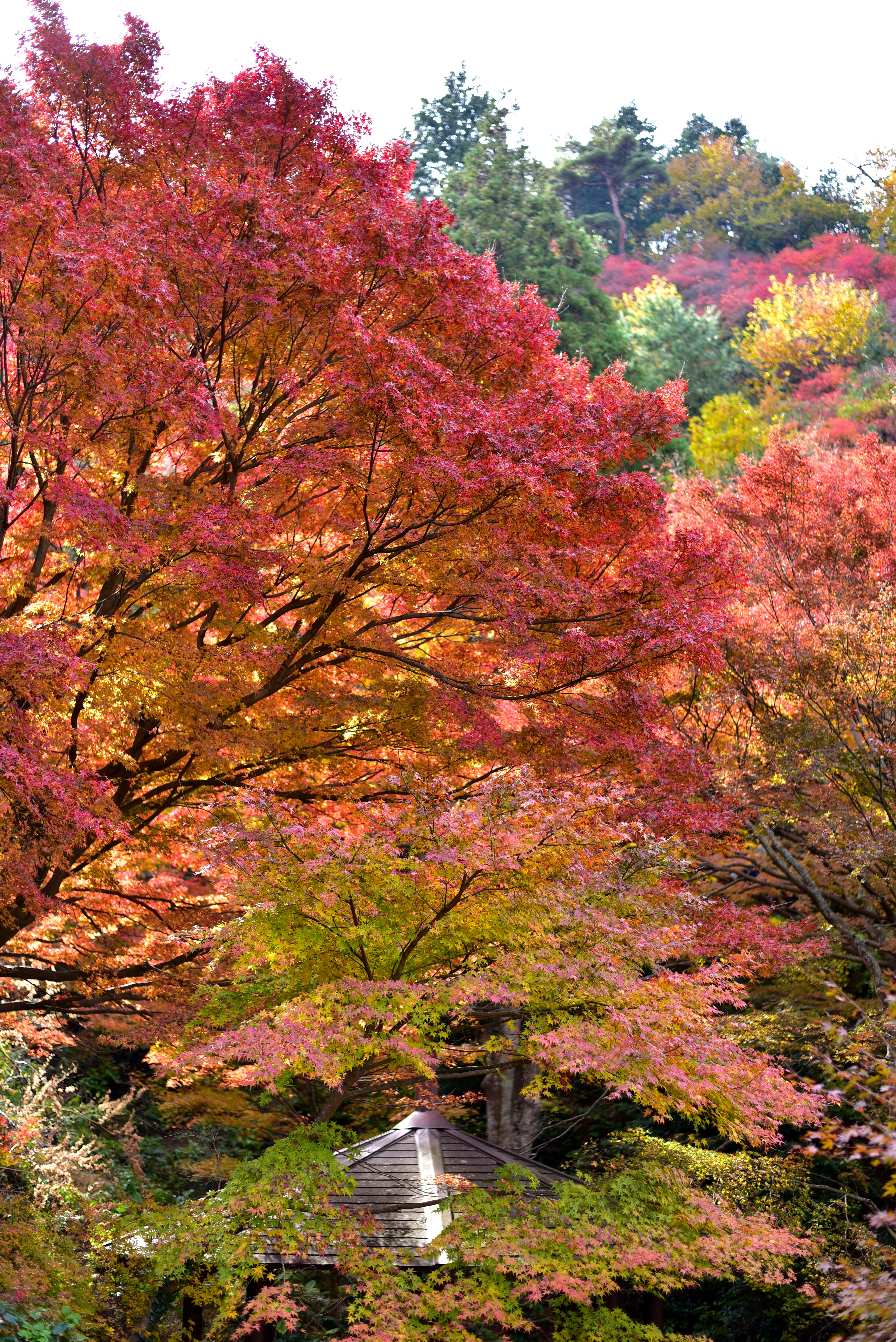 宮路山の紅葉